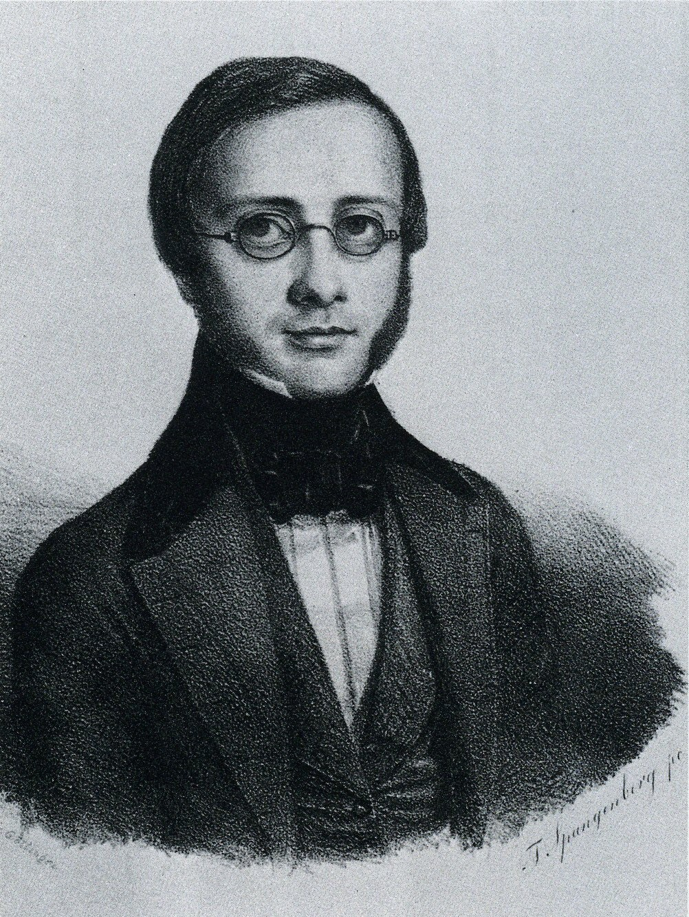 Friedrich Wieseler, Porträt (Stich) von Friedrich Spangenberg